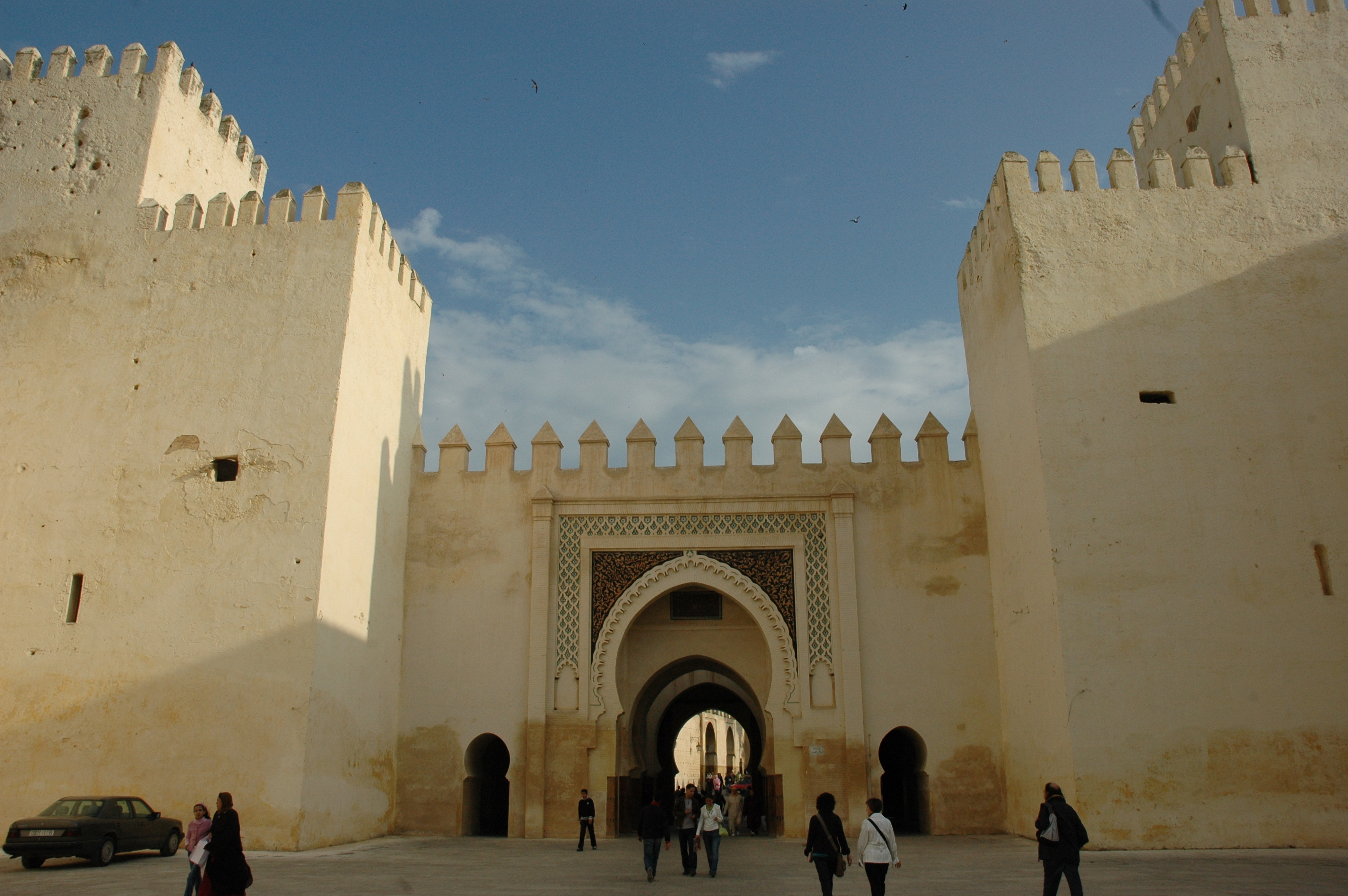 Fes - Palau Reial - Bab El Seba des del nord